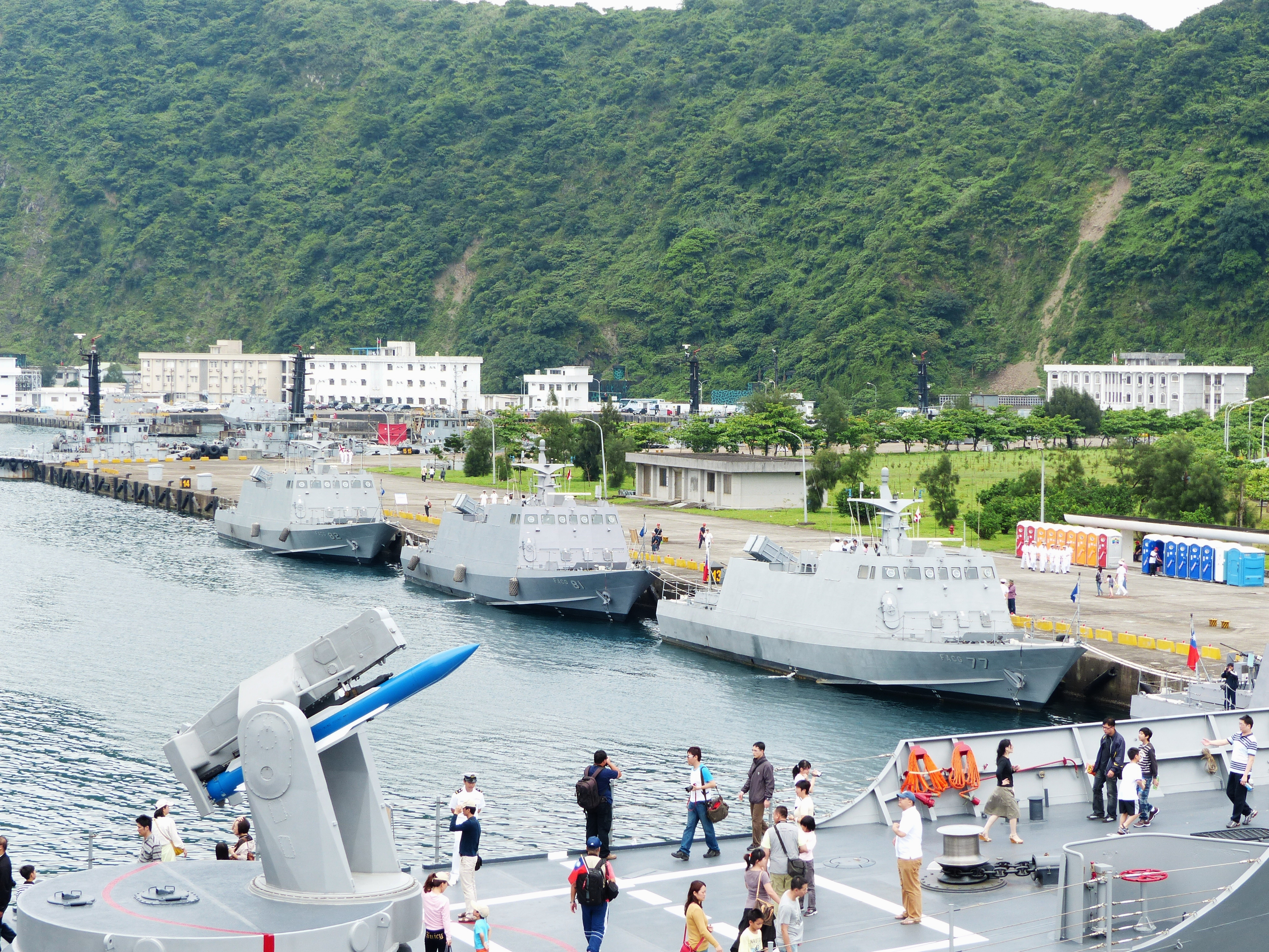 2013年中正軍港營區開放活動，停泊13號碼頭開放參觀的光華六號飛彈快艇FACG-77、FACG-81、FACG-82，攝於巡防艦鳳陽（FFG-933）前部最上甲板。